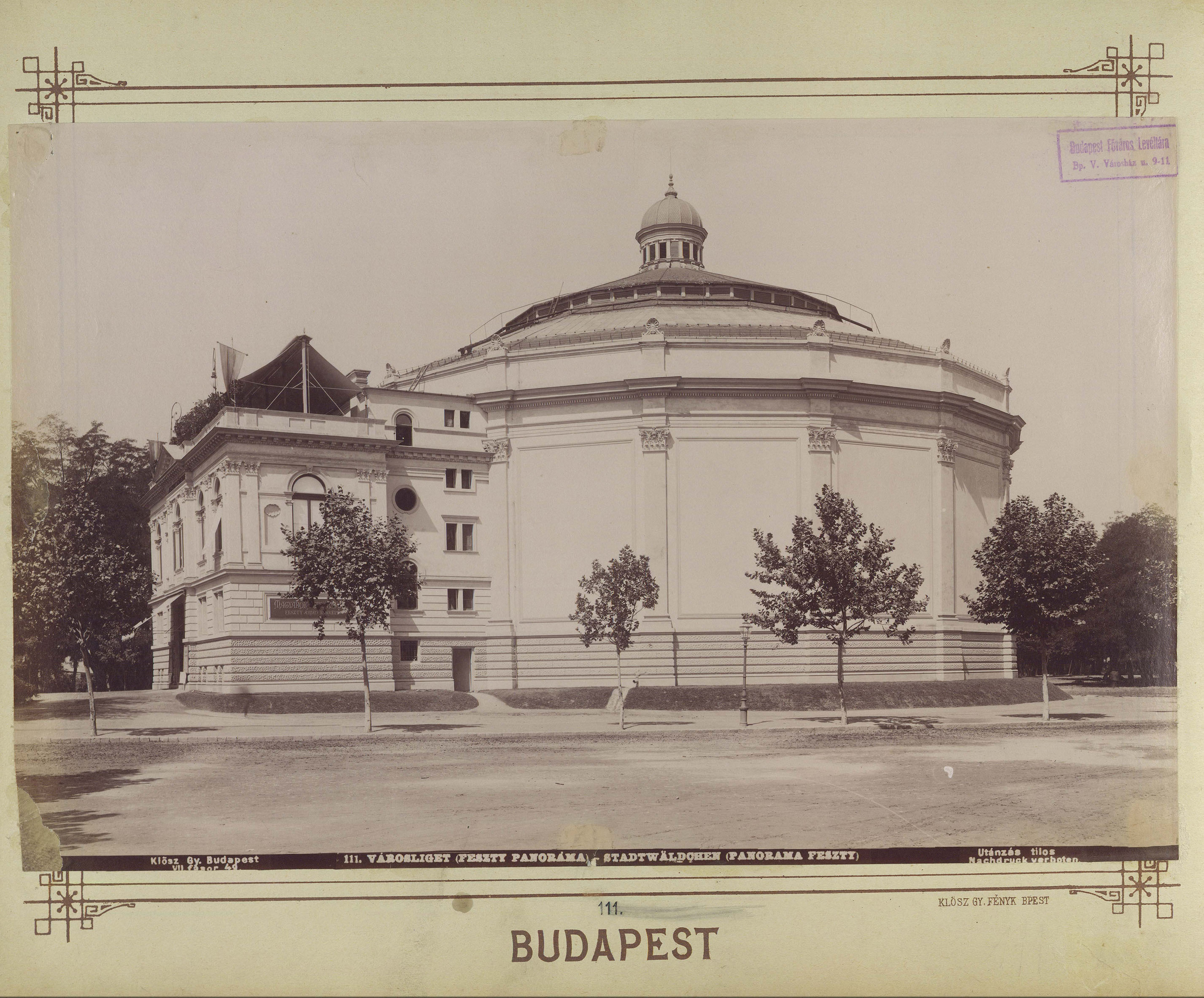 Rotunda, a Feszty-körkép (A magyarok bejövetele) épülete a mai Szépművészeti Múzeum helyén. A felvétel 1895 körül készült. A kép forrását kérjük így adja meg: Fortepan / Budapest Főváros Levéltára. Levéltári jelzet: HU.BFL.XV.19.d.1.07.112 Location: Hungary, Budapest XIV. Tags: Budapest Title: Rotunda, a Feszty-körkép (A magyarok bejövetele) épülete a mai Szépművészeti Múzeum helyén. A felvétel 1895 körül készült. A kép forrását kérjük így adja meg: Fortepan / Budapest Főváros Levéltára. Levéltári jelzet: HU.BFL.XV.19.d.1.07.112